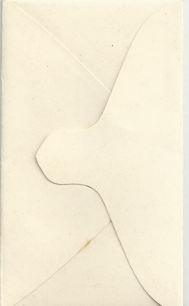 Klein envelopje uit de periode dat er nog geen reguliere afmetingen voor bestonden, in de afmetingen 85 x 48 mm. Het is ongeveer rond 1898 gemaakt door de Boek- en Steendrukkerij firma B. van Mantgem, in het Gebouw De Fakkel aan het Muntplein 9 te Amsterdam.